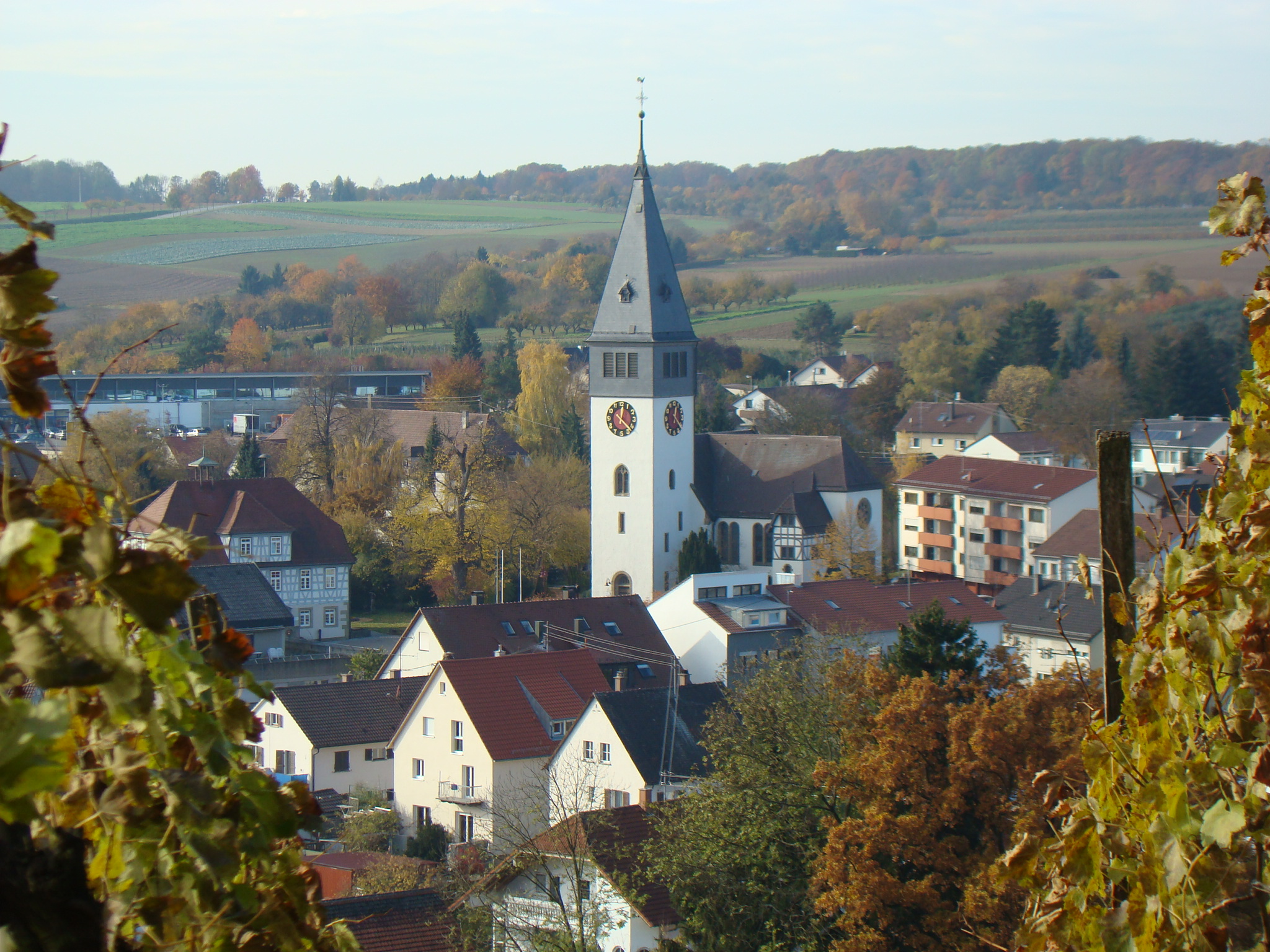 Johanneskirche in Untergruppenbach, Foto: Peter Schmelzle 2011